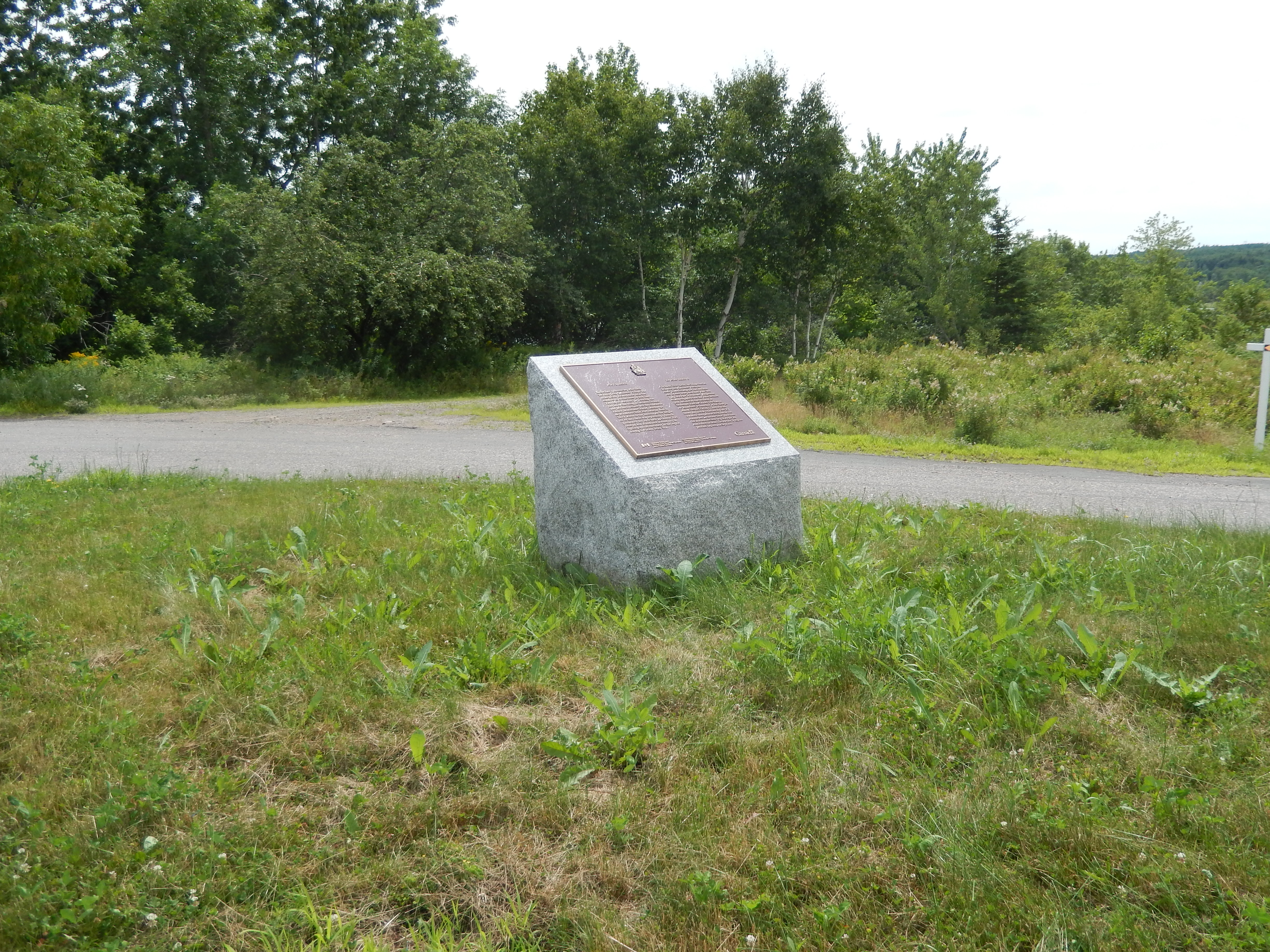 Monument du fort Nerepis en août 2016.